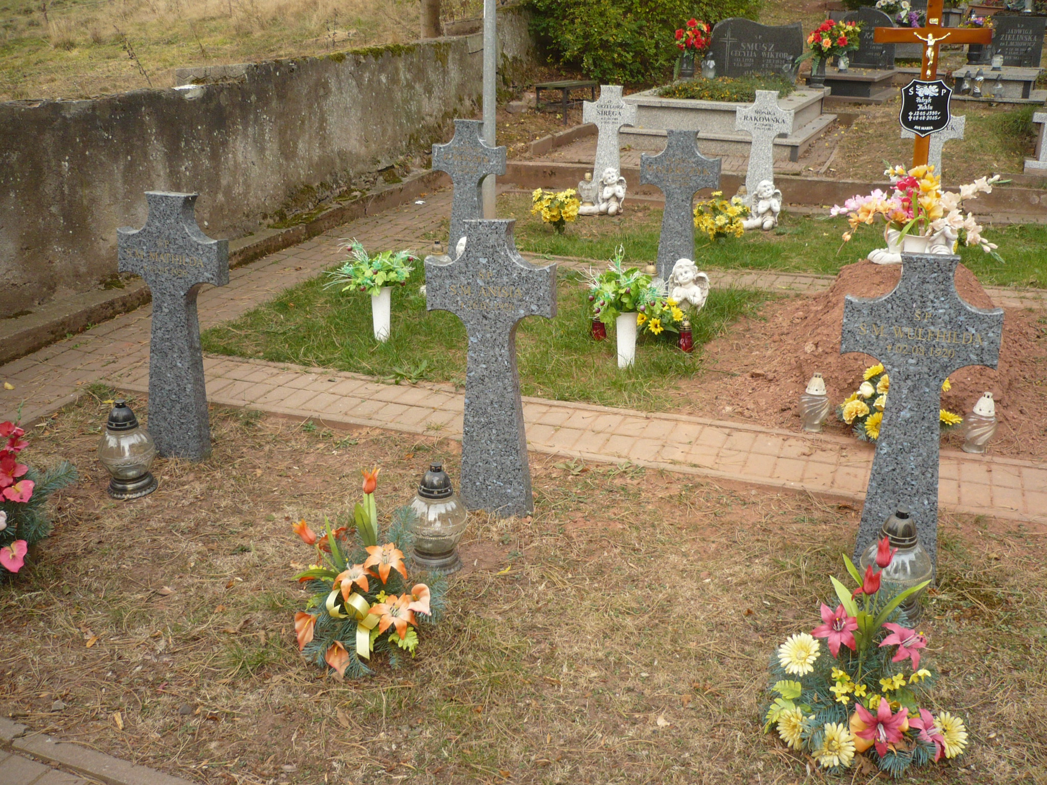 Ludwikowice Kłodzkie. Kwatera sióstr zakonnych